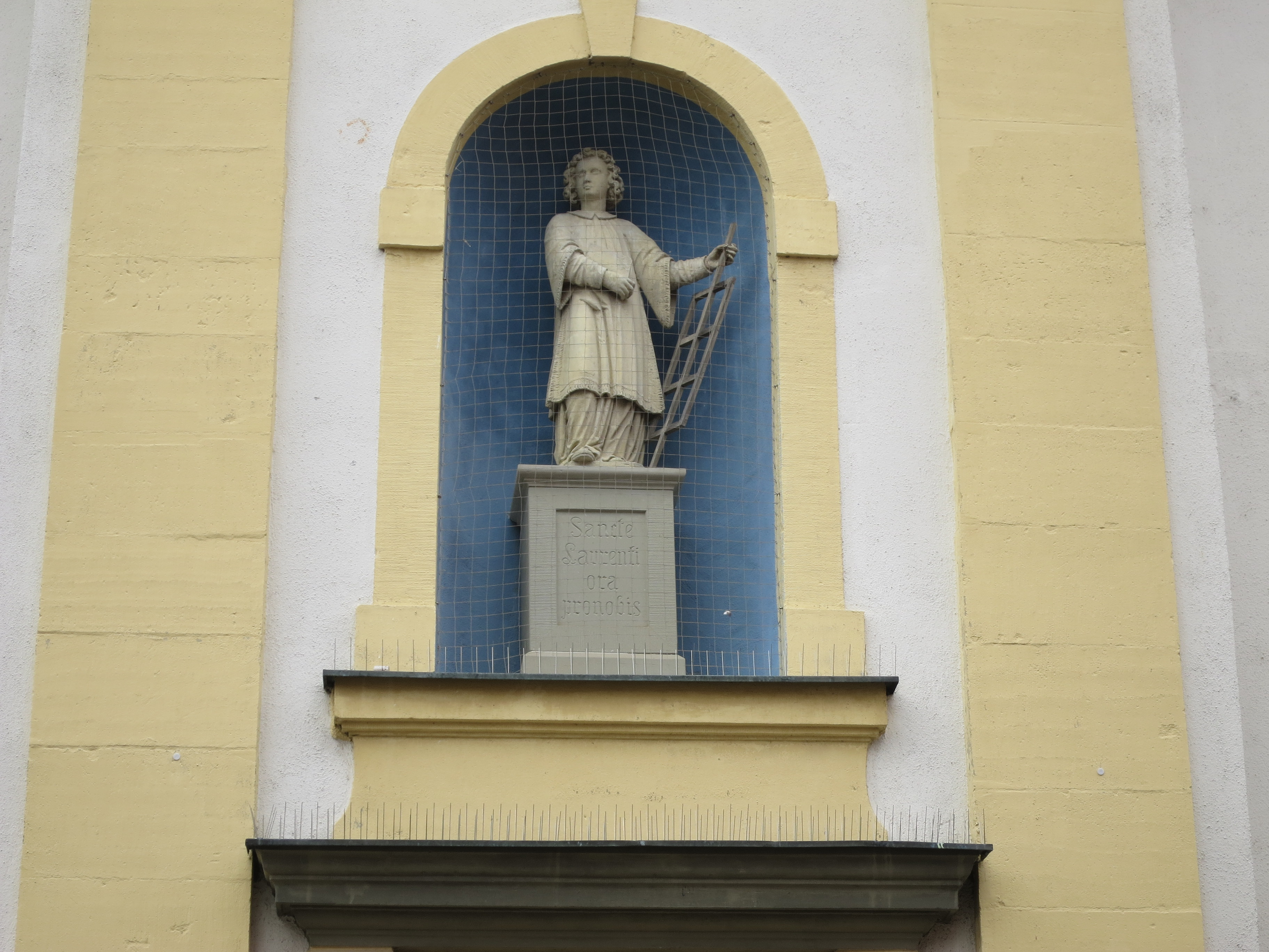 Die spätbarocke Dorfkirche des Stadtteils Würzburg-Lengfeld